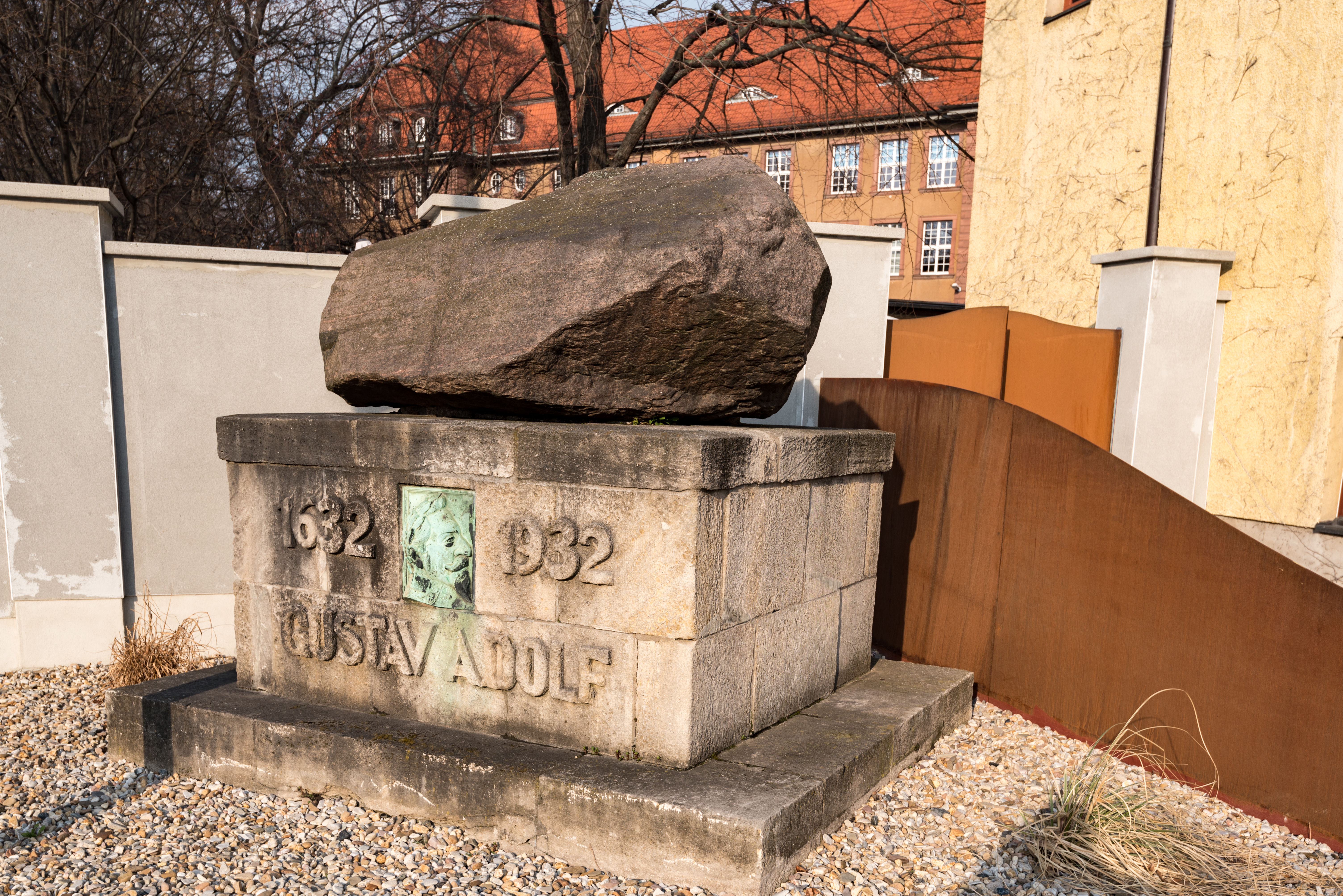 Weißenfels, Friedrichstraße, Gustav-Adolf-Stein